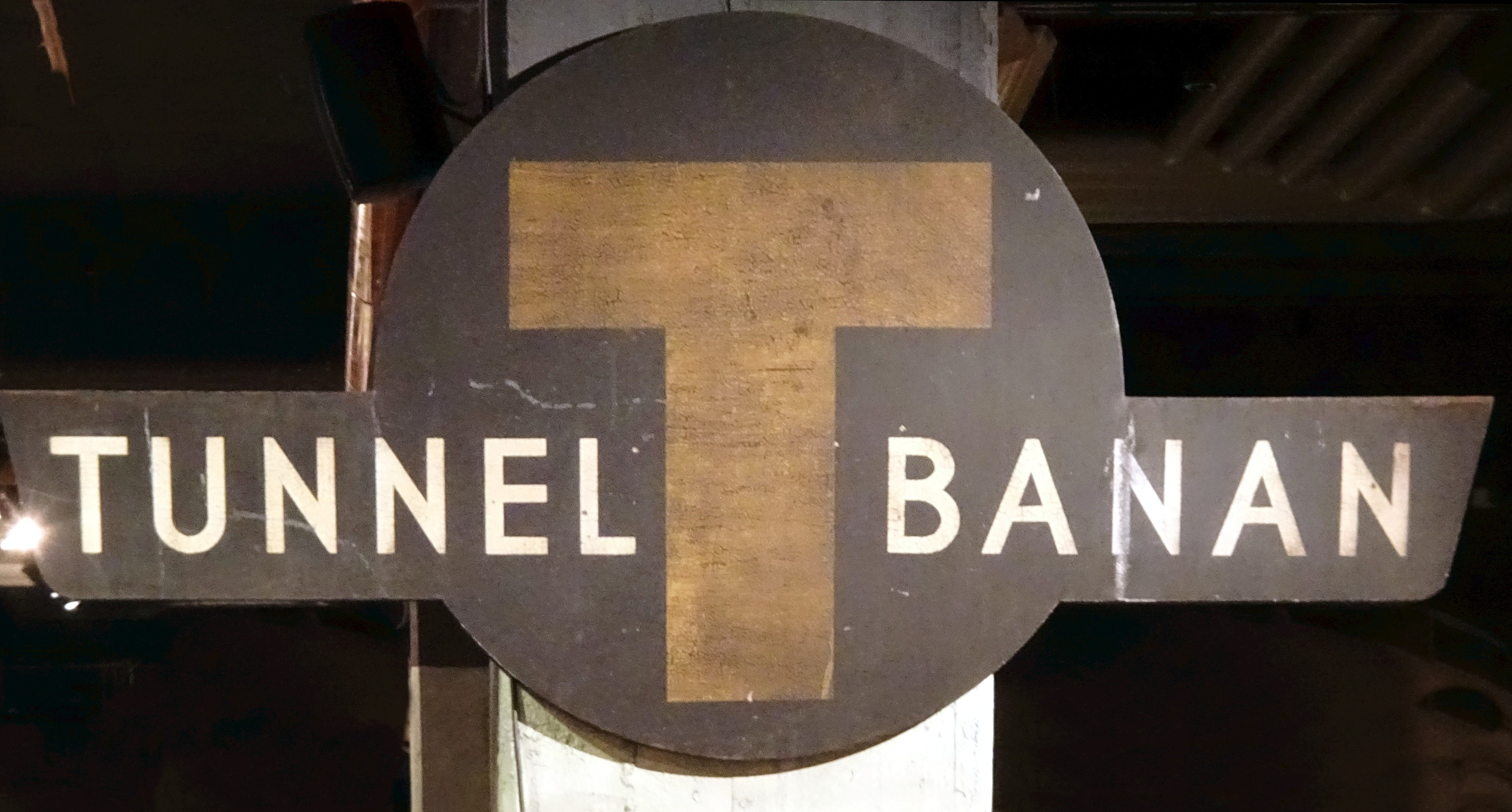 Skylt Tunnelbanan, skapad 1933 av Kalle Lodén